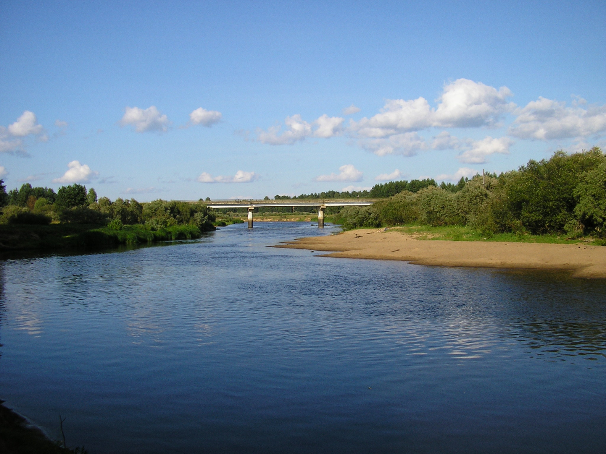 Волчина у Максатихи